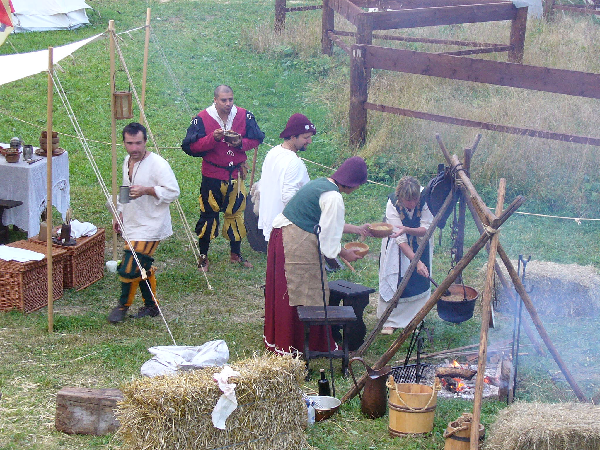 Schaustellergruppe im Lager